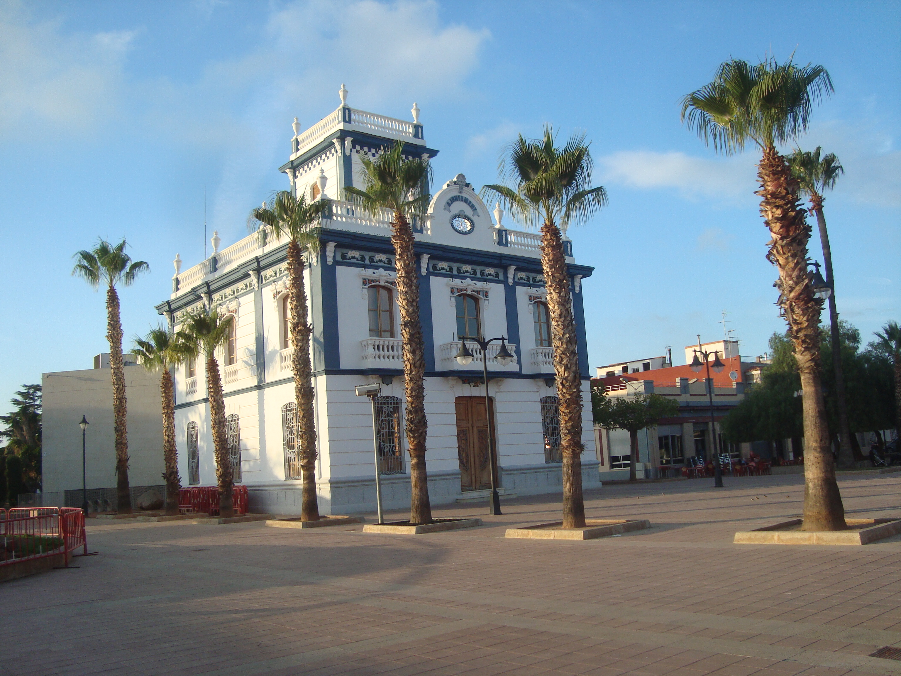 Ajuntament de Les Alqueries (Castelló)